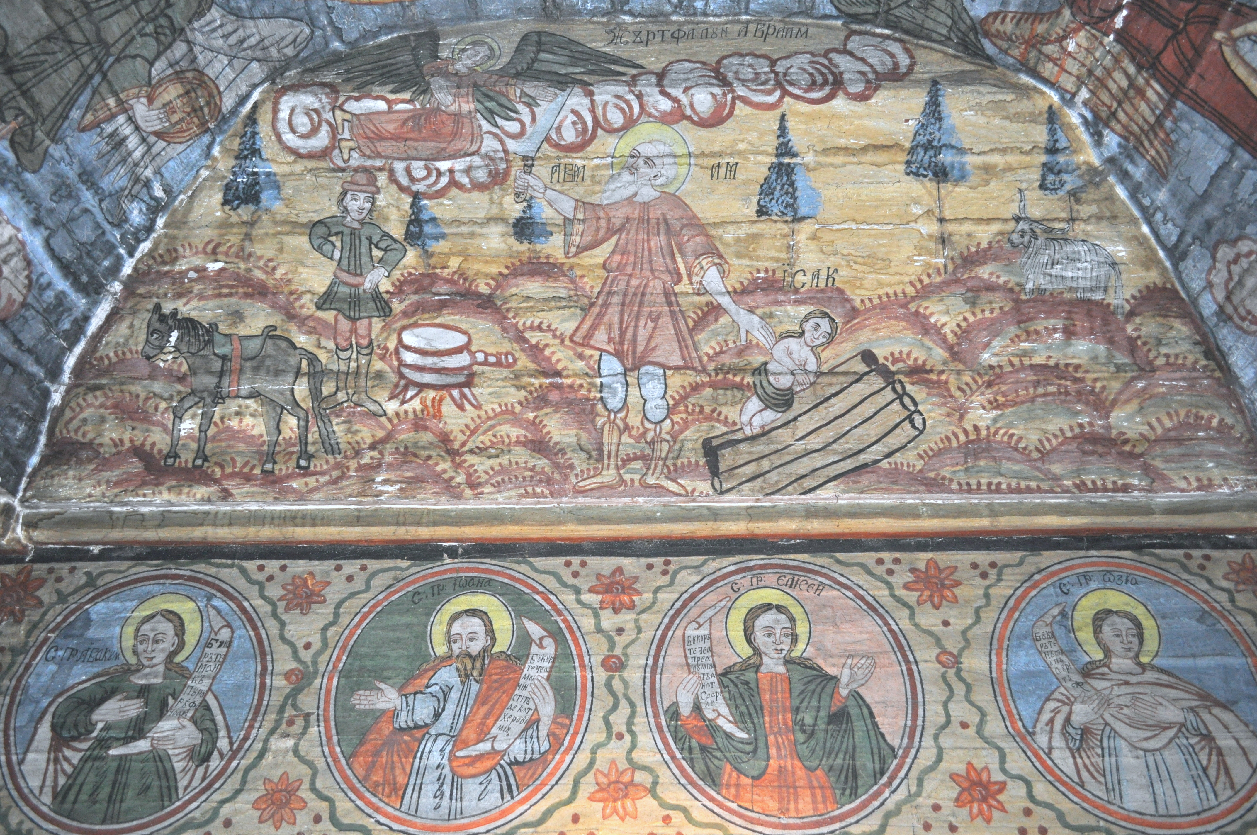 Biserica de lemn „Sfinții Arhangheli” din Runc, județul Alba